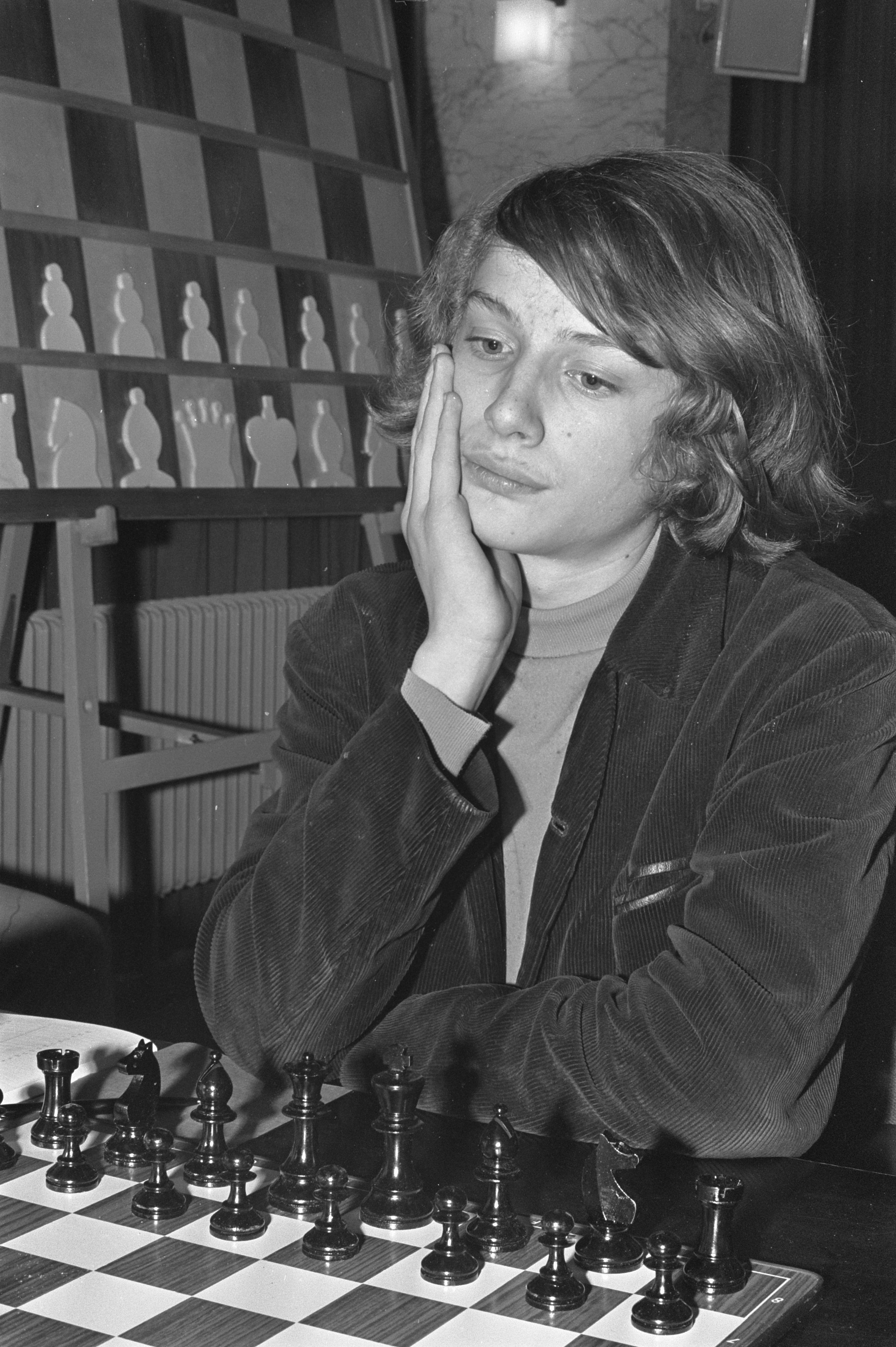 Collectie / Archief : Fotocollectie Anefo Reportage / Serie : [ onbekend ] Beschrijving : Zesde Niemeyer Jeugdschaaktoernooi te Groningen. Jan Timman Datum : 27 december 1967 Locatie : Groningen Trefwoorden : portretten, schaken, sport Persoonsnaam : Timman, Jan Fotograaf : Nijs, Jac. de / Anefo Auteursrechthebbende : Nationaal Archief Materiaalsoort : Negatief (zwart/wit) Nummer archiefinventaris : bekijk toegang 2.24.01.05 Bestanddeelnummer : 920-9512